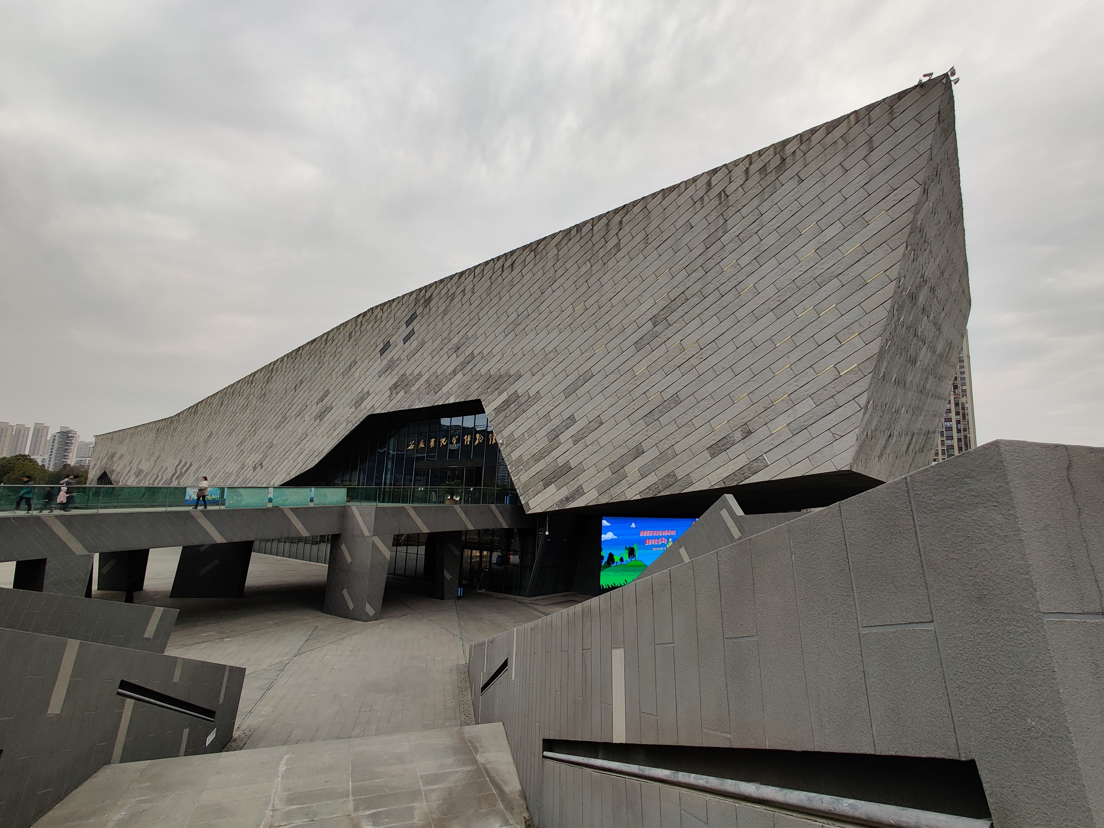 中文（中国大陆）: 安徽省地质博物馆